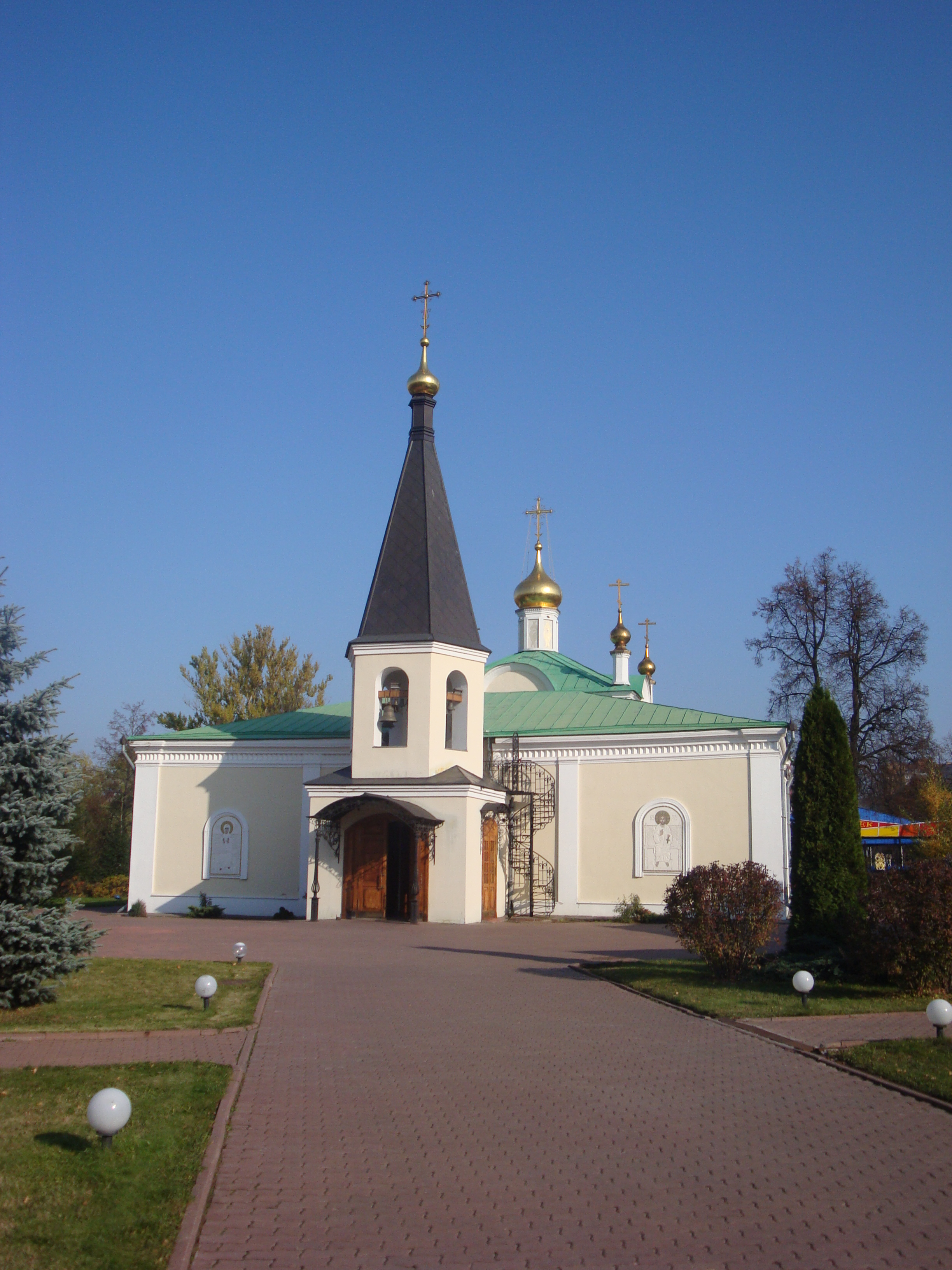 Церковь Воскресения Словущего в Подольске